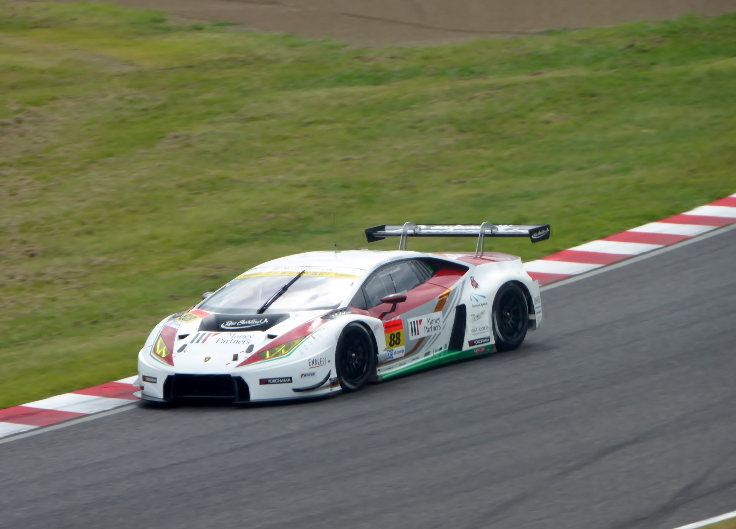 2016年鈴鹿1000㎞における88号車マネパランボルギーニGT3を撮影。